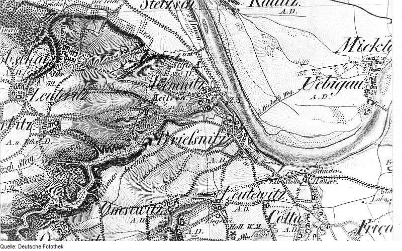 Original image description from the Deutsche Fotothek Dresden-Briesnitz. Oberreit, Sect. Dresden, 1821/22